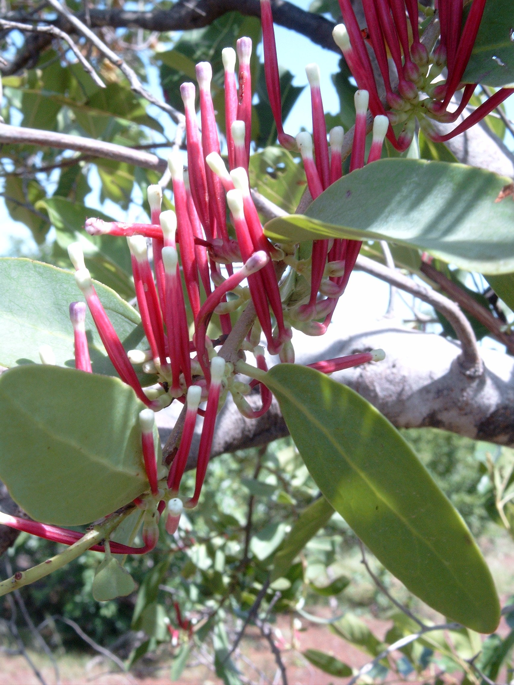 Tapinanthus globifer (spelling!), Burkina Faso.